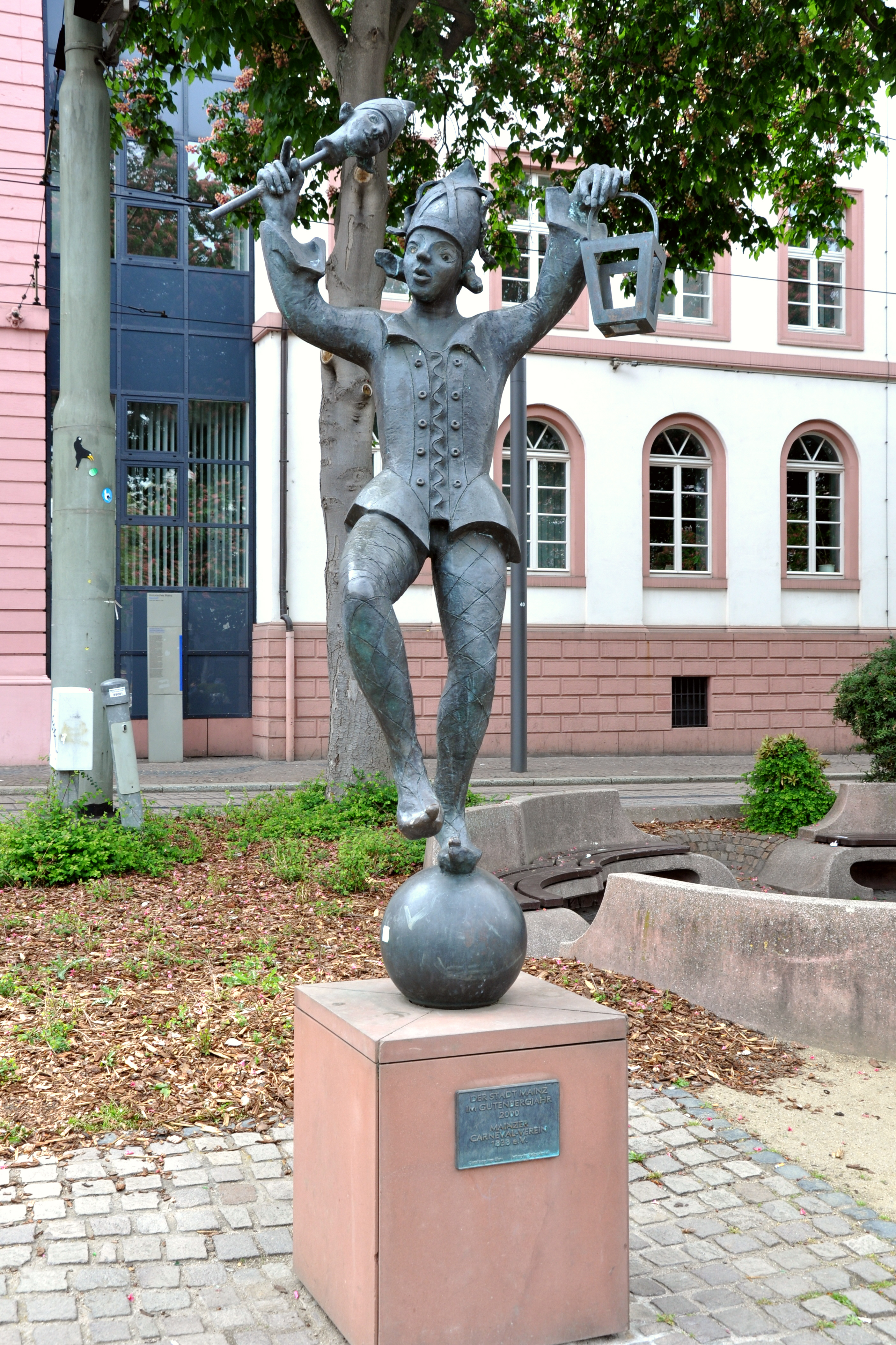 Mainz, Schillerplatz, Statue „Bajazz mit der Laterne“ von Inge Blum